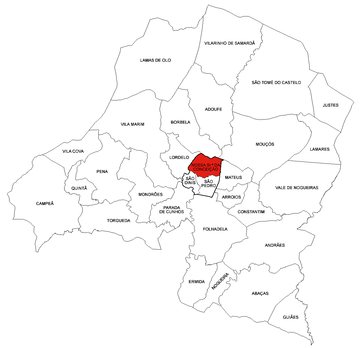 Freguesia de Nossa Senhora da Conceição (concelho de Vila Real)